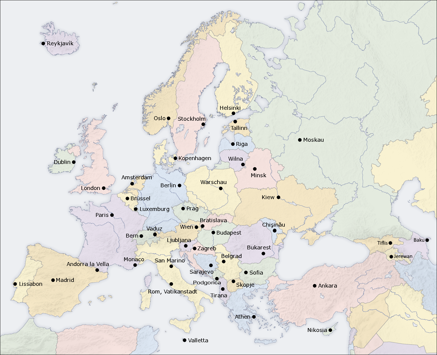 Capitals in Europe, German map